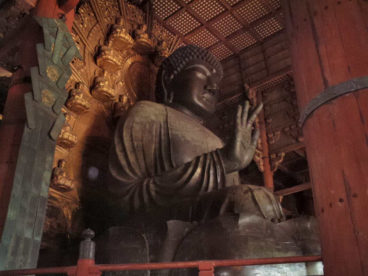 投稿者本人が撮影